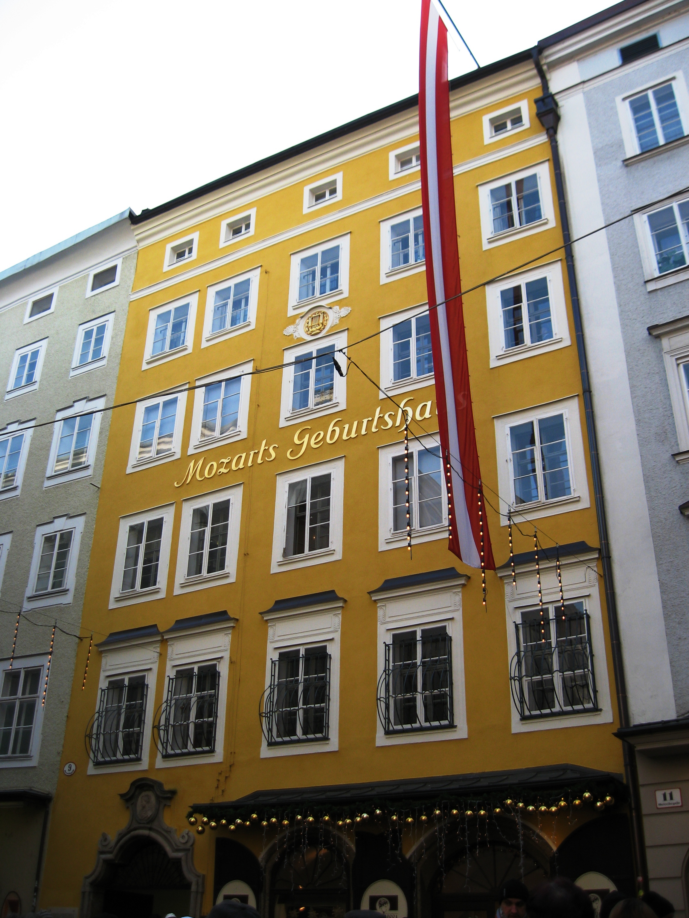 Mozartova rojstna hiša v Salzburgu.